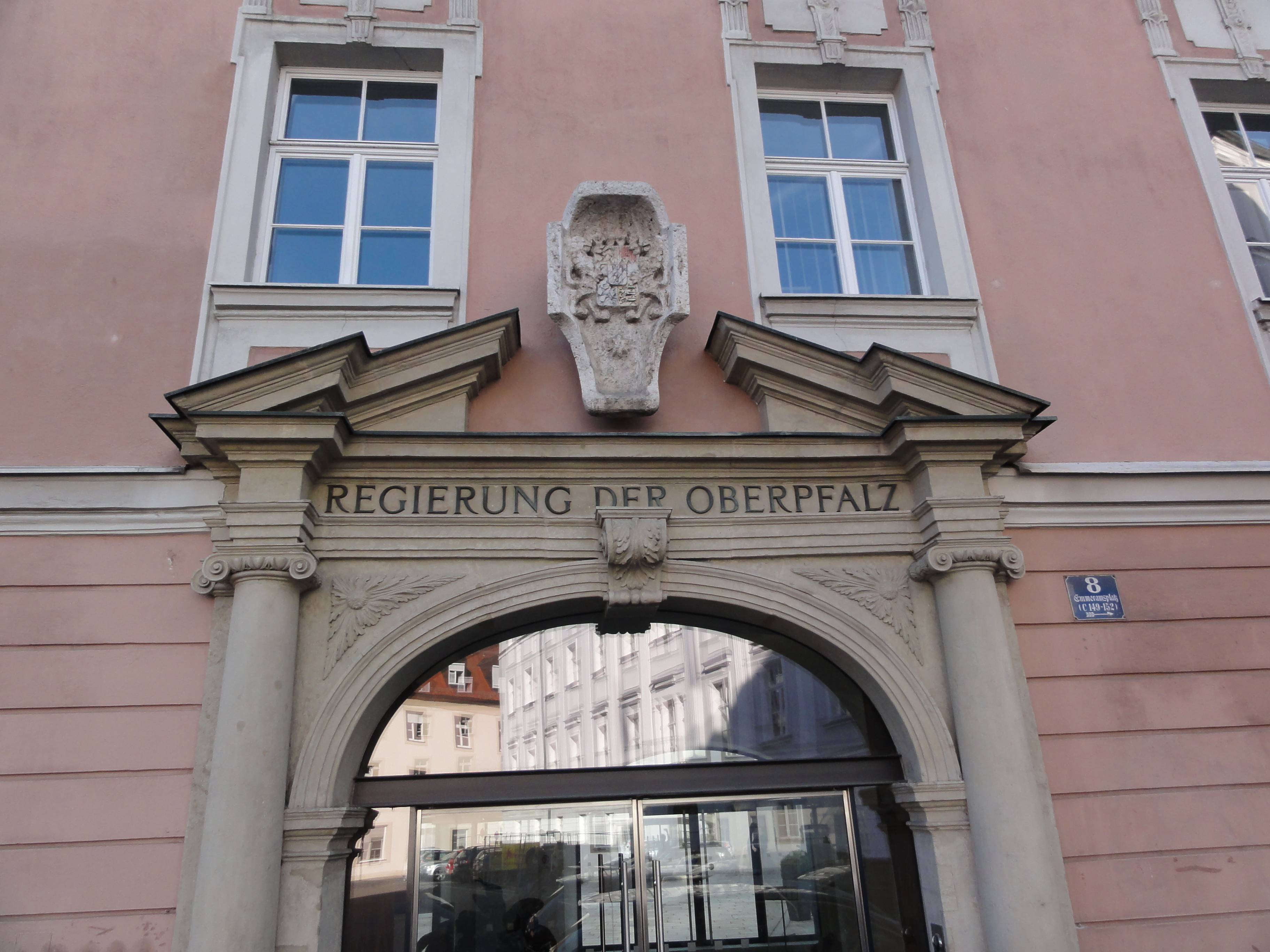 Regensburg, Regierung der Oberpfalz - Eingang